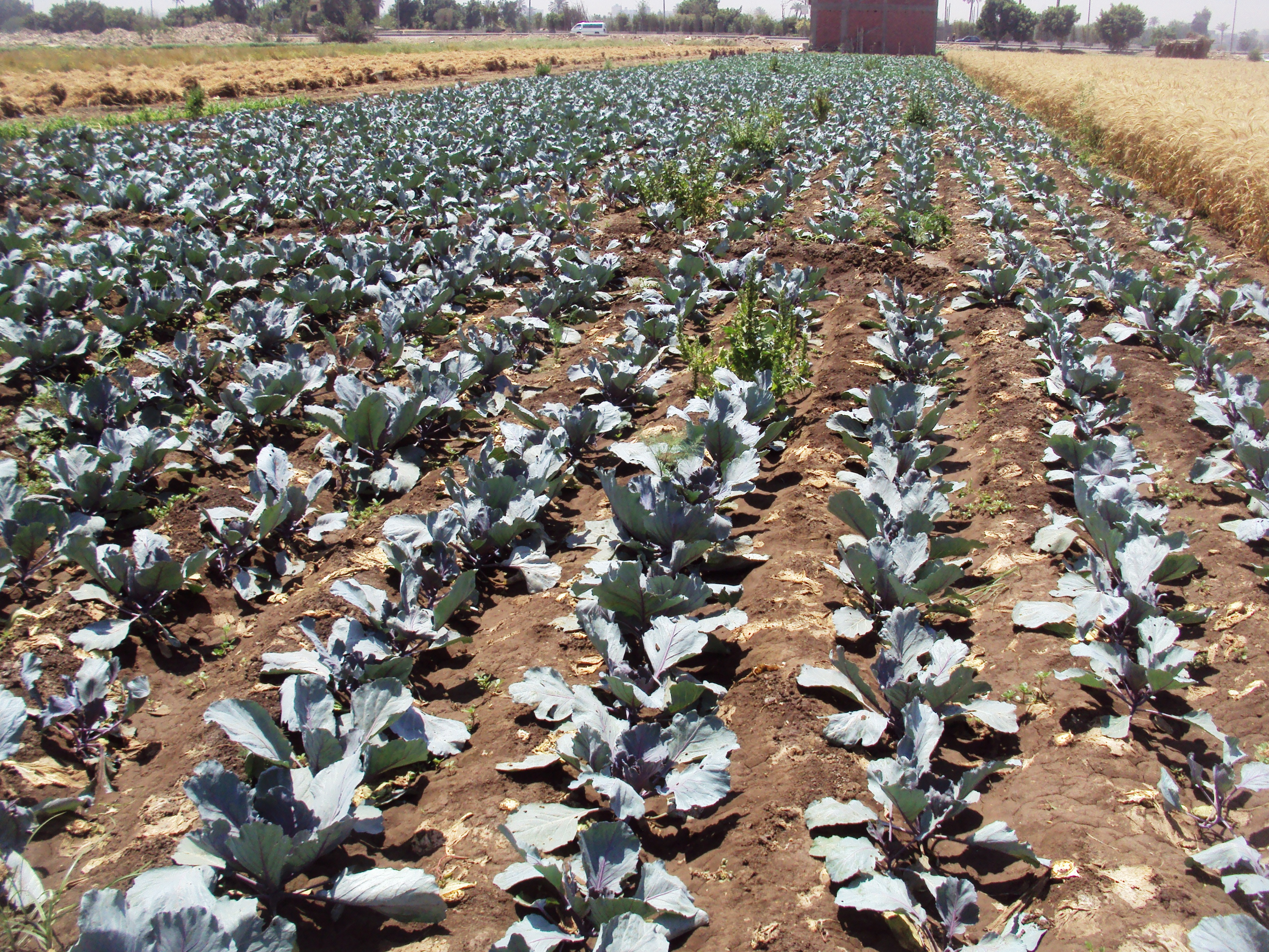 أحد حقول الكرنب في مصر.